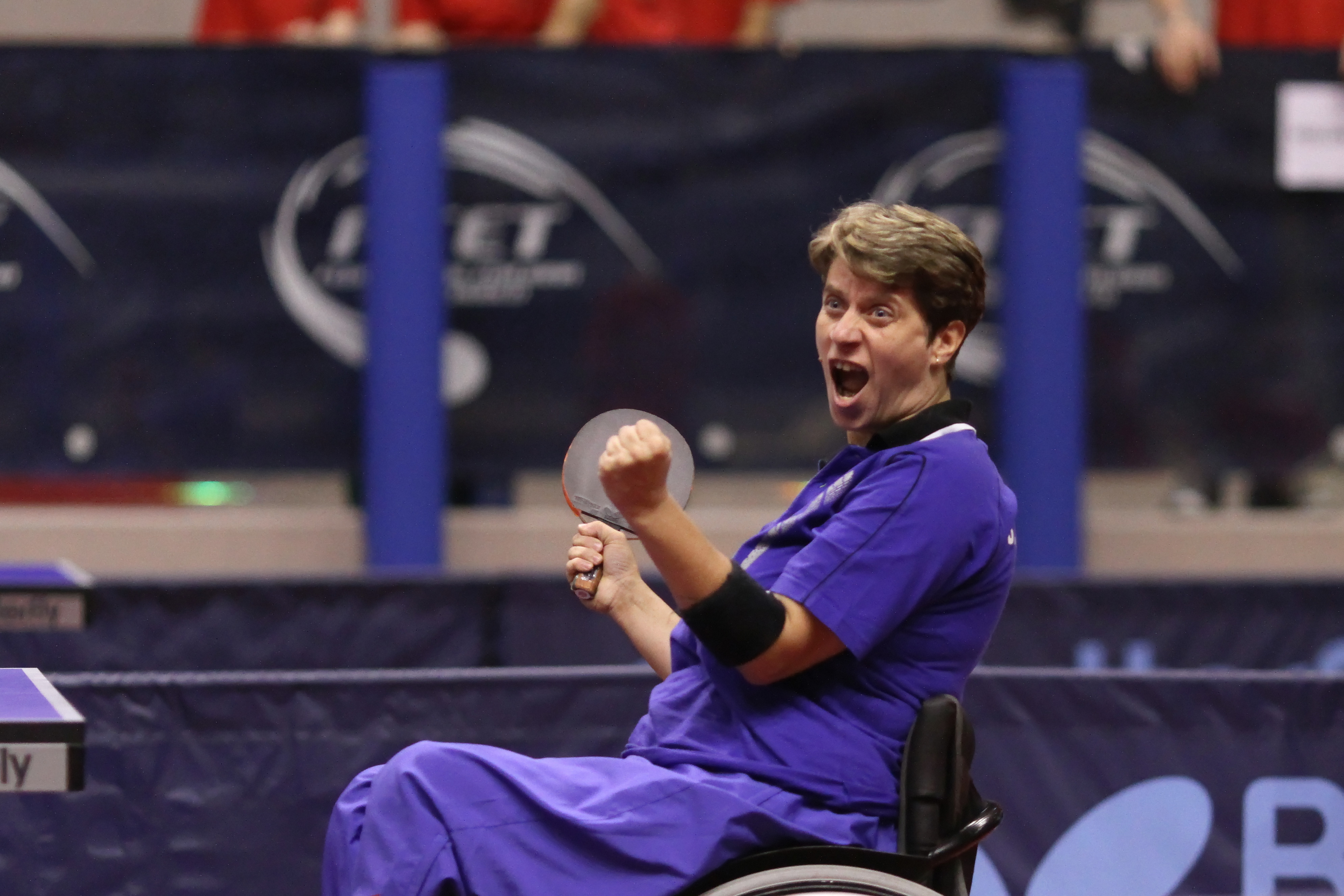 PERIC RANKOVIC Borislava (SRB) IMG_2601_DxO